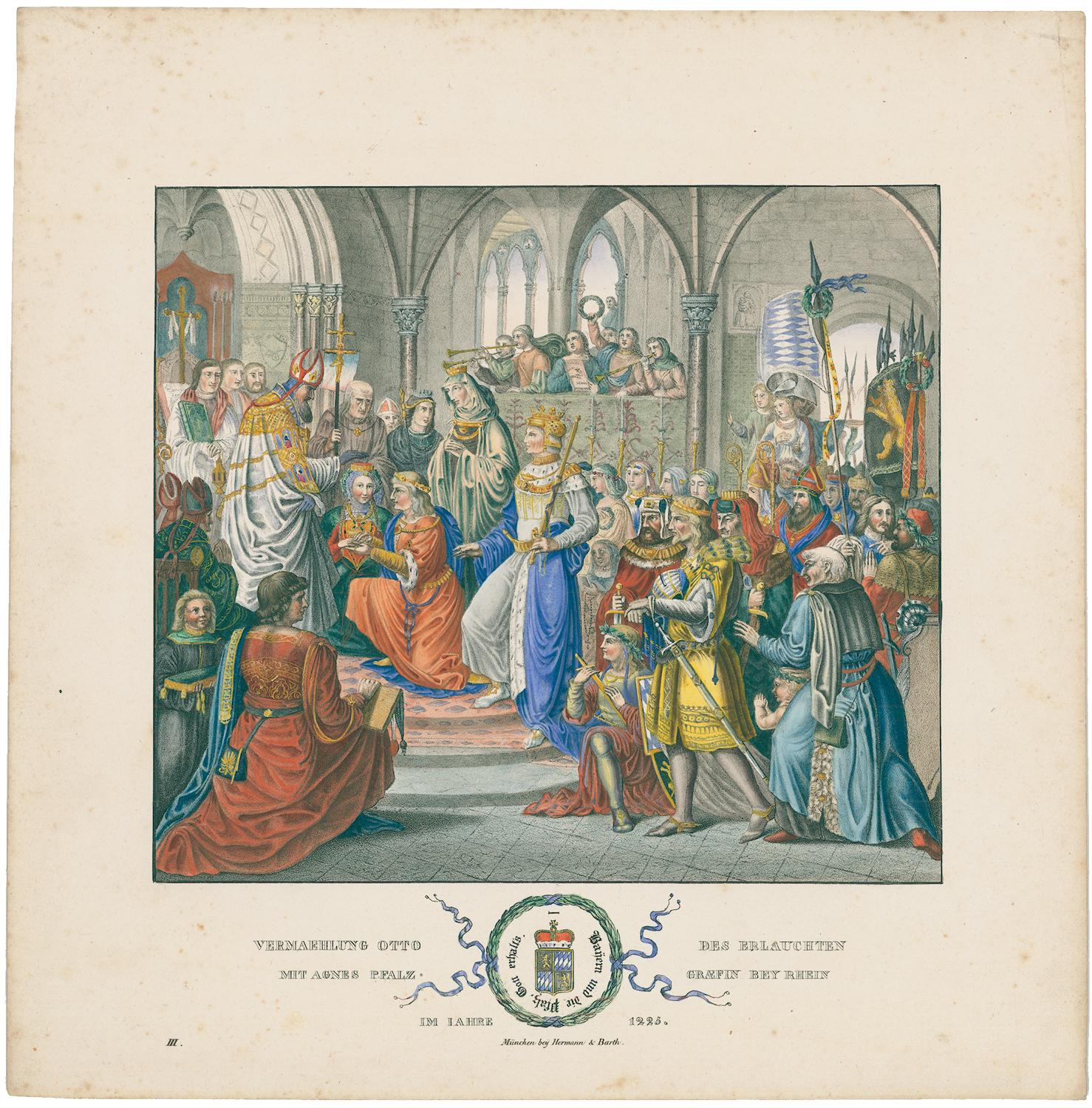 Vermaehlung Otto des Erlauchten mit Agnes Pfalzgraefin bey Rhein im Jahre 1225 Röckel, Wilhelm